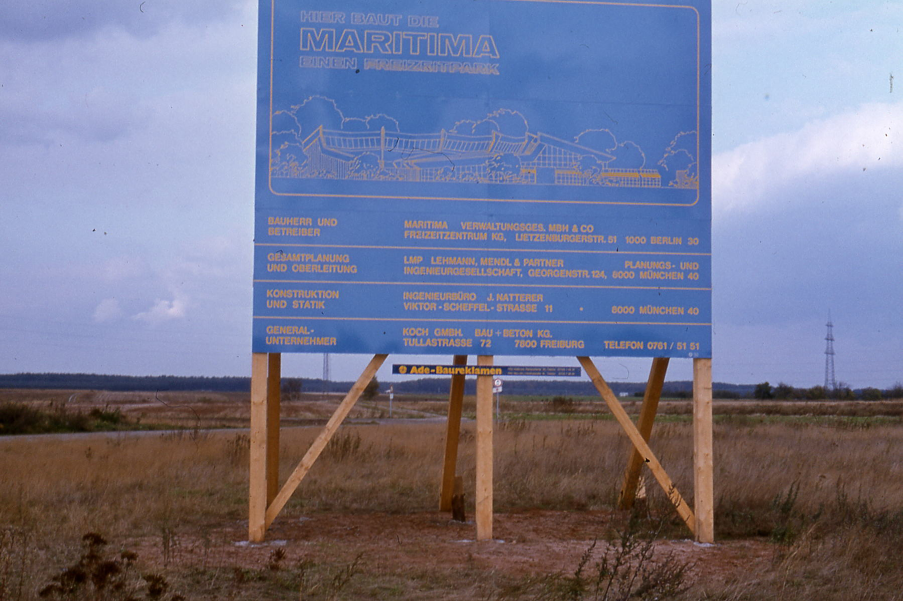 Badesee Rodgau (Hessen) (Deutschland): Bauschild des Maritima-Projekts 1979.